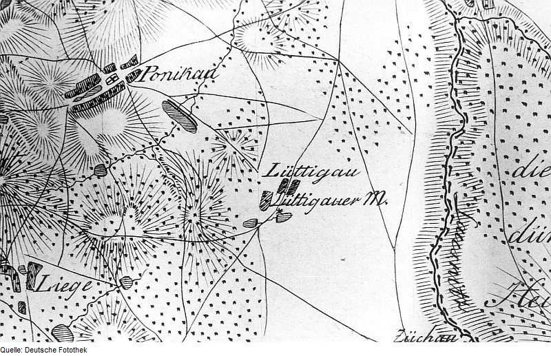 Original image description from the Deutsche Fotothek Thiendorf-Lüttichau. Situationskarten von den Kriegsschauplätzen des 7jährigen Krieges, Bl. 3 Senftenberg-Hoyerswerda, 1805 (Sign.: VIII 57)